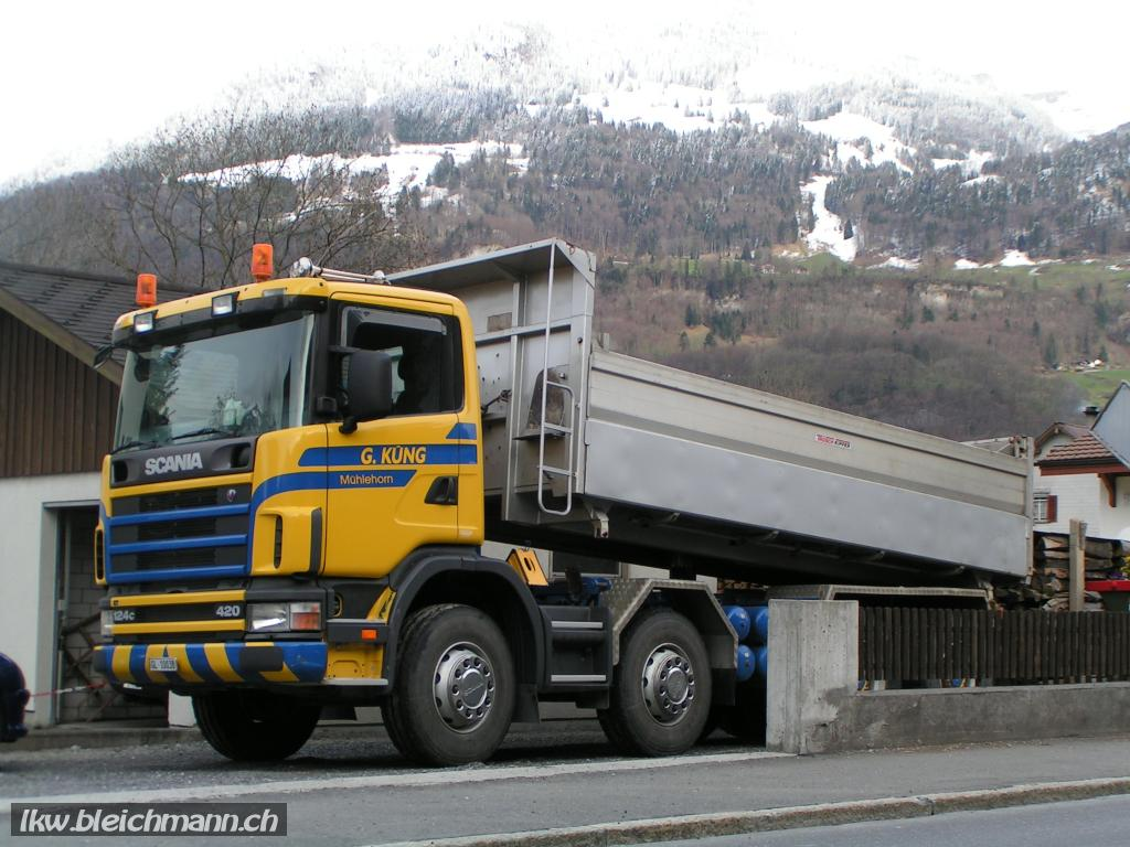 Scania 124 C